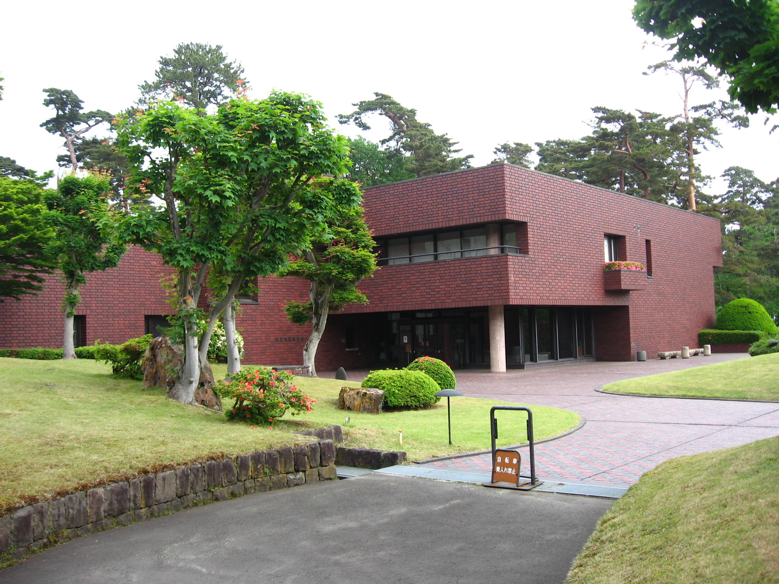 弘前市立博物館（青森県弘前市）